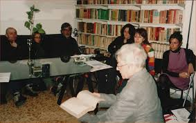 Silvia Montefoschi com seus alunos